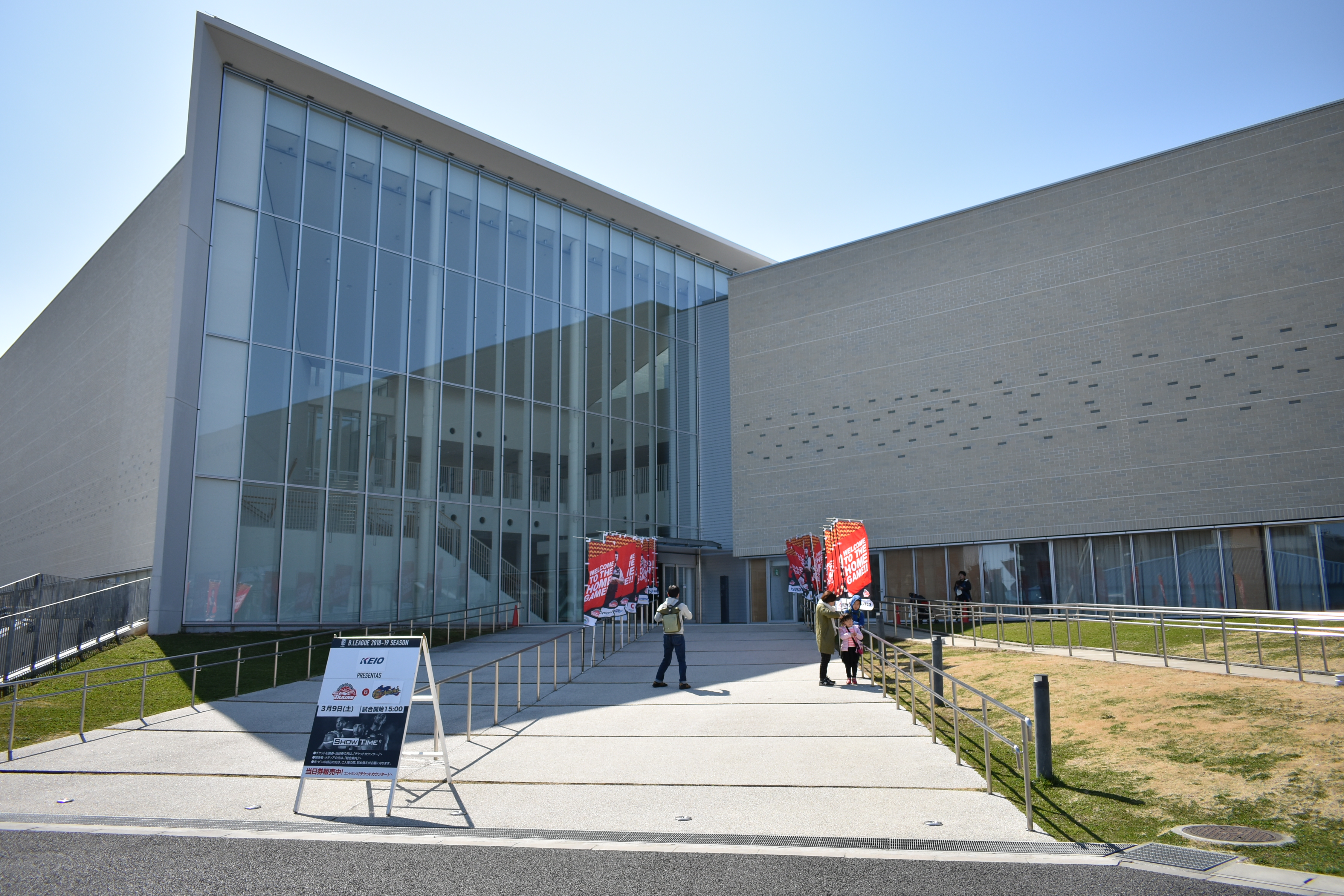 八王子市総合体育館 Nikon D3400